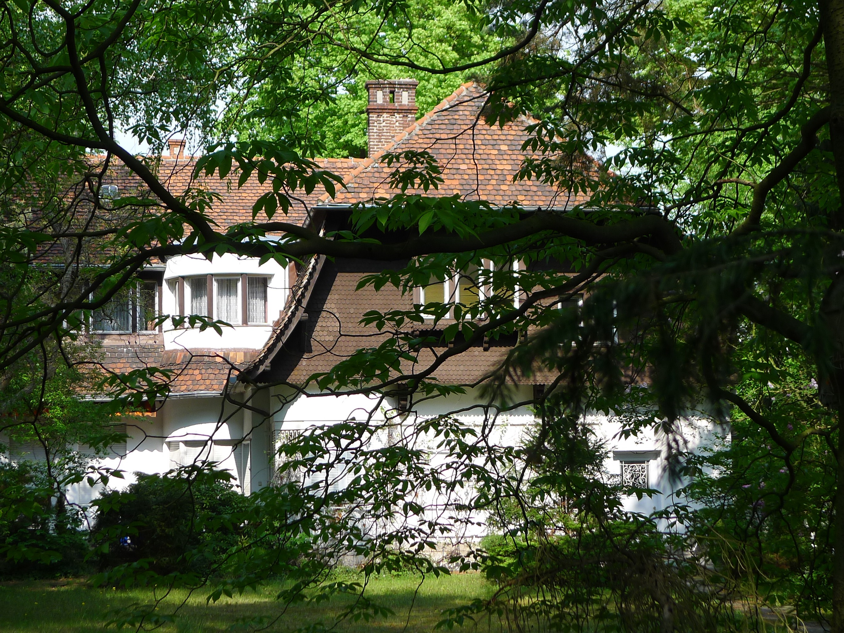 Villa